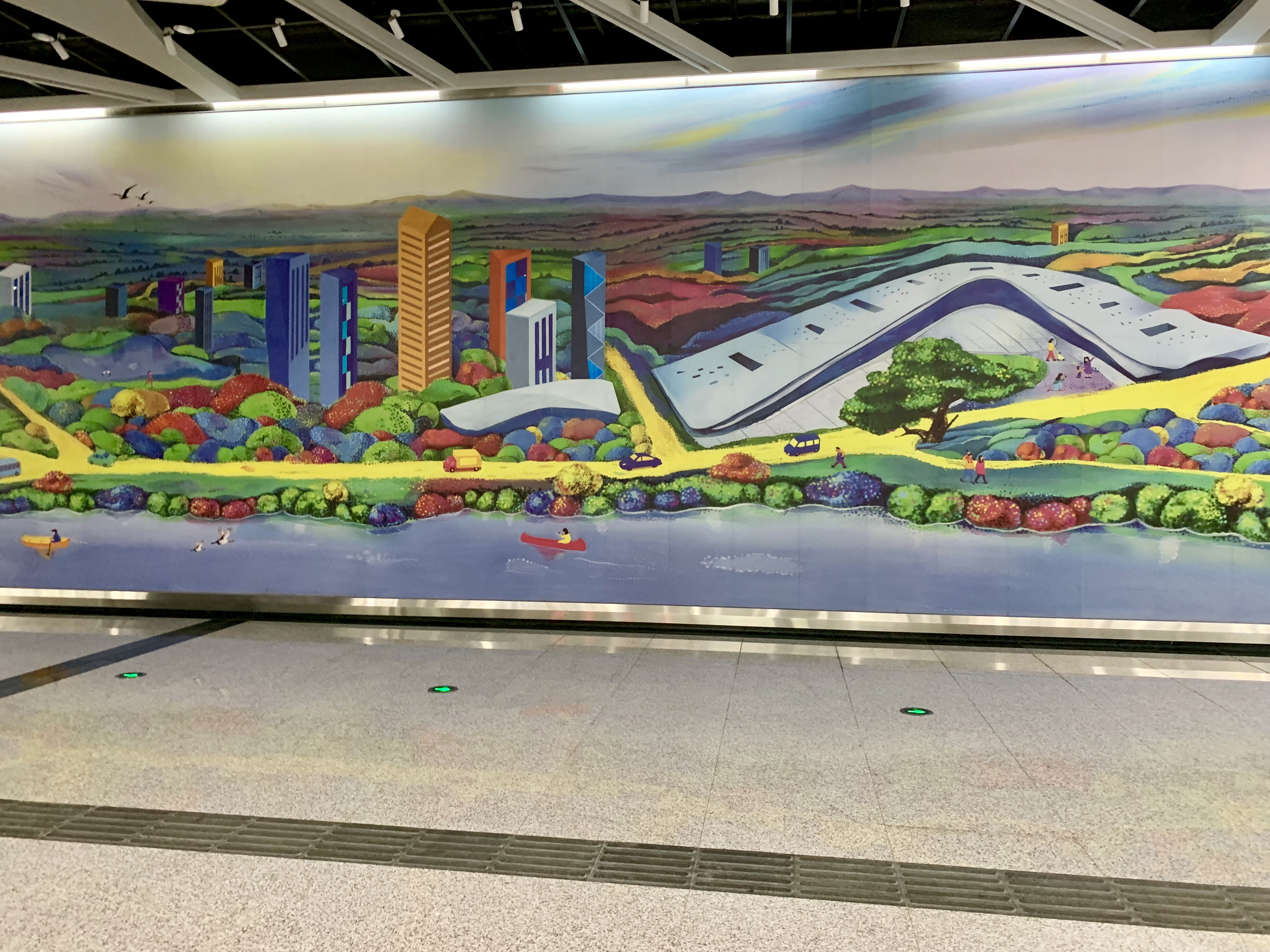 成都地铁武汉路站